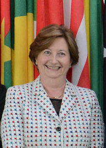 El presidente Mauricio Macri visitó a las autoridades de la Corte Penal Internacional (CPI) y reafirmó el pleno compromiso de la Argentina de defender los derechos humanos y condenar los delitos de lesa humanidad y todo tipo de violencia.